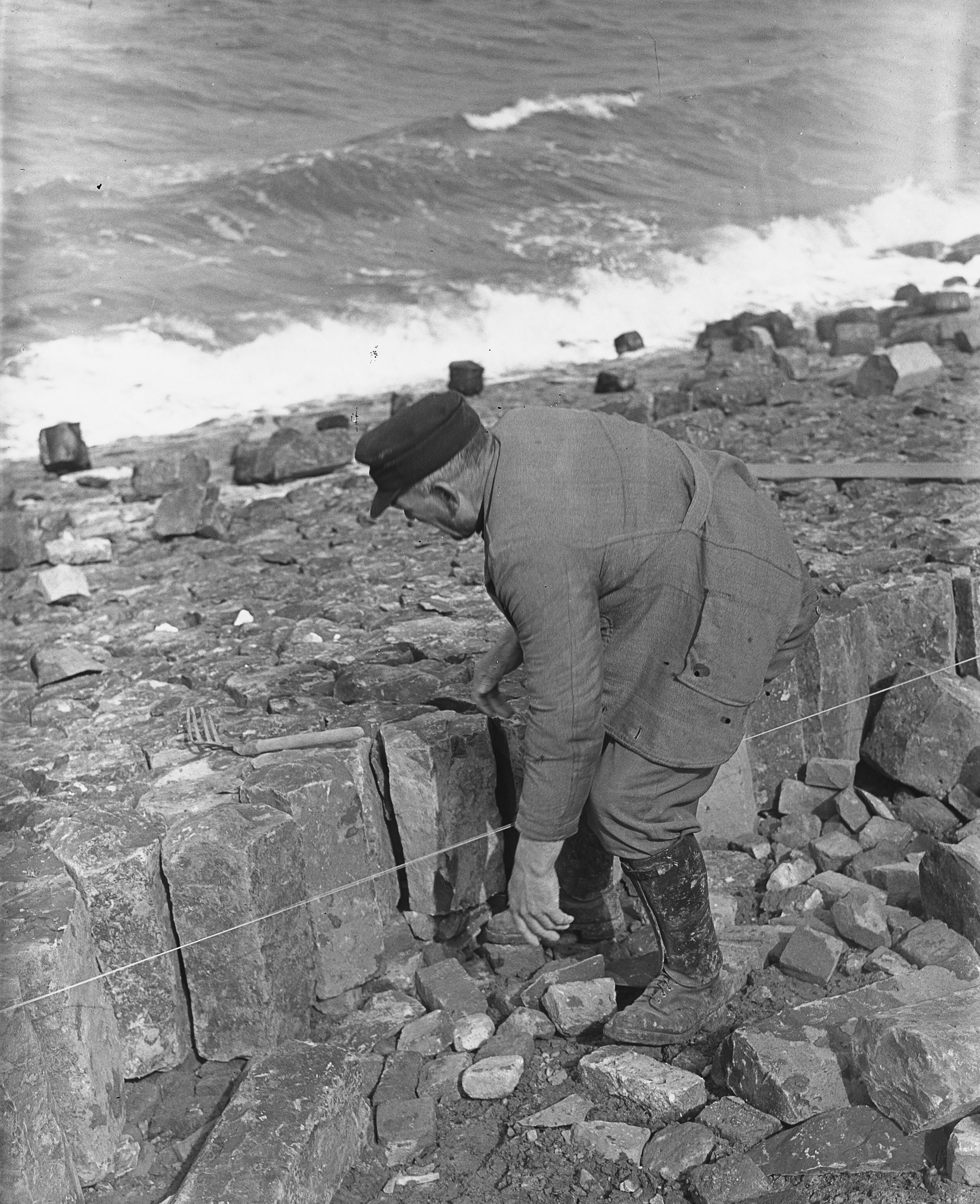 Collectie / Archief : Fotocollectie Anefo Reportage / Serie : [ onbekend ] Beschrijving : Duitse steenzetters werken op Afsluitdijk Datum : 7 april 1953 Trefwoorden : STEENZETTERS Persoonsnaam : Afsluitdijk Fotograaf : Duinen, […] van / Anefo Auteursrechthebbende : Nationaal Archief Materiaalsoort : Glasnegatief Nummer archiefinventaris : bekijk toegang 2.24.01.09 Bestanddeelnummer : 905-6532